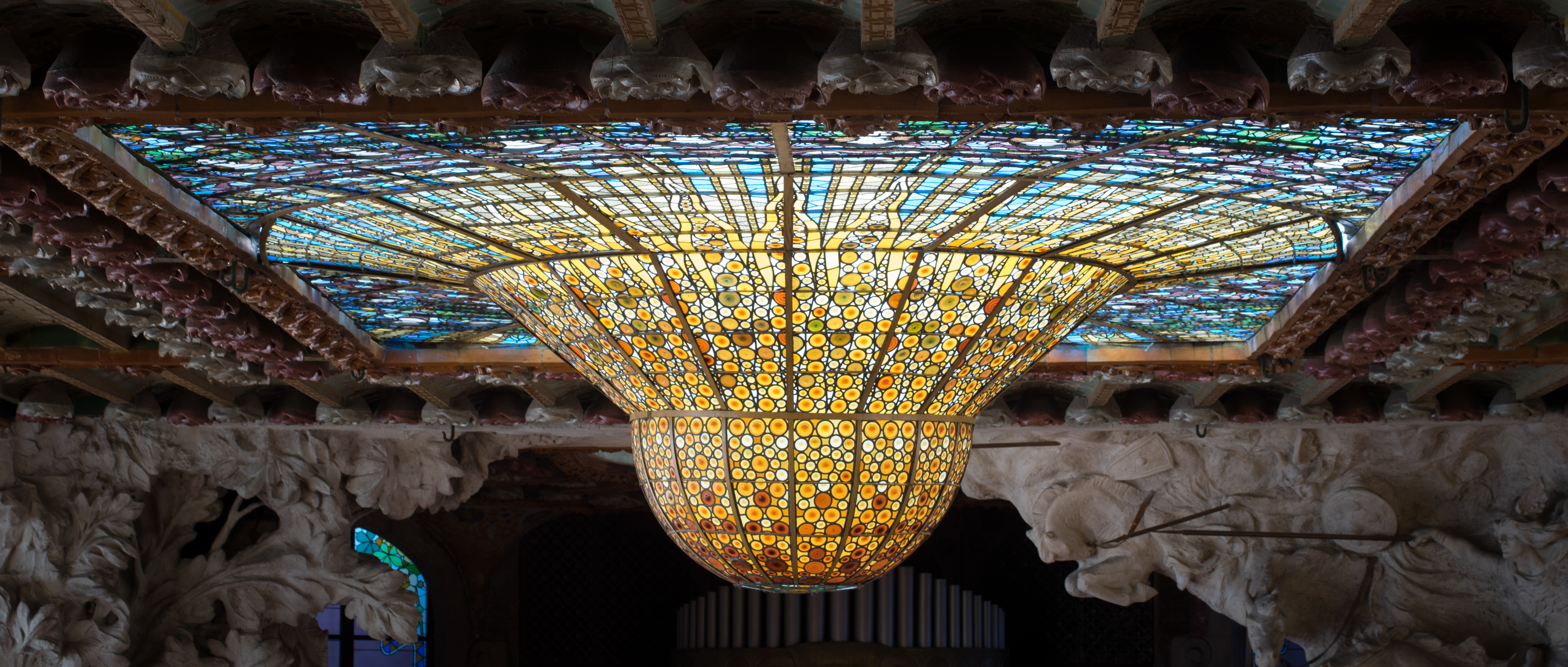 Palau de la Música Catalana ceiling.